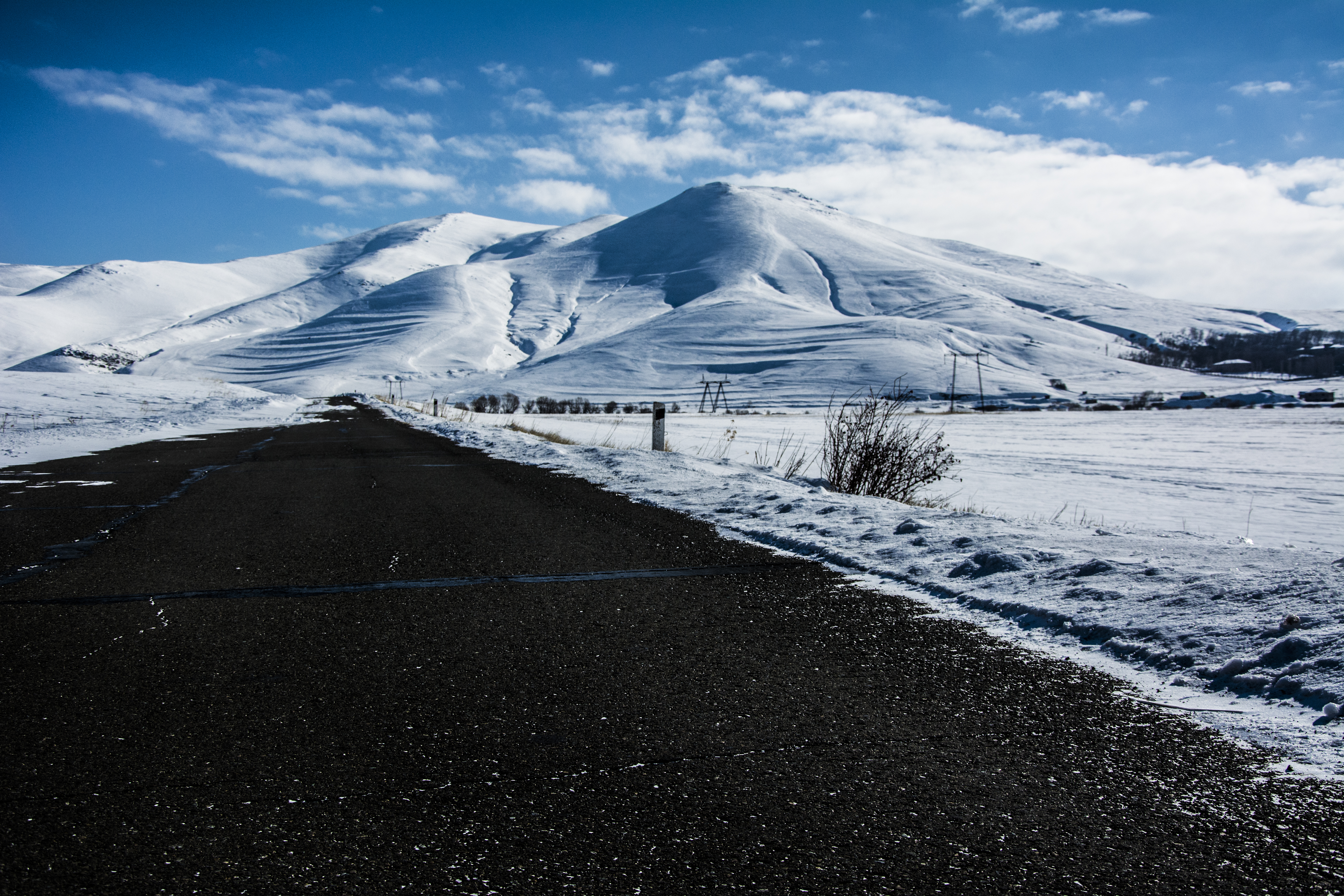 Հատիս (Հադիս, Շամիրամի լեռ), հրաբխային լեռնազանգված ՀՀ Կոտայքի մարզում, Կոտայքի սարավանդի հյուսիս-արևելքում։ Բարձրությունը՝ 2528 մ։ Կոնաձև է, լանջերը կտրտված են խոր ձորակներով։ Կան ժայռոտ ելուստներ։ Կազմված է պալեոգենի լավաներից ու պեռլիտներից։ Հարավային ստորոտից սկիզբ են առնում Քառասունակն աղբյուրները։